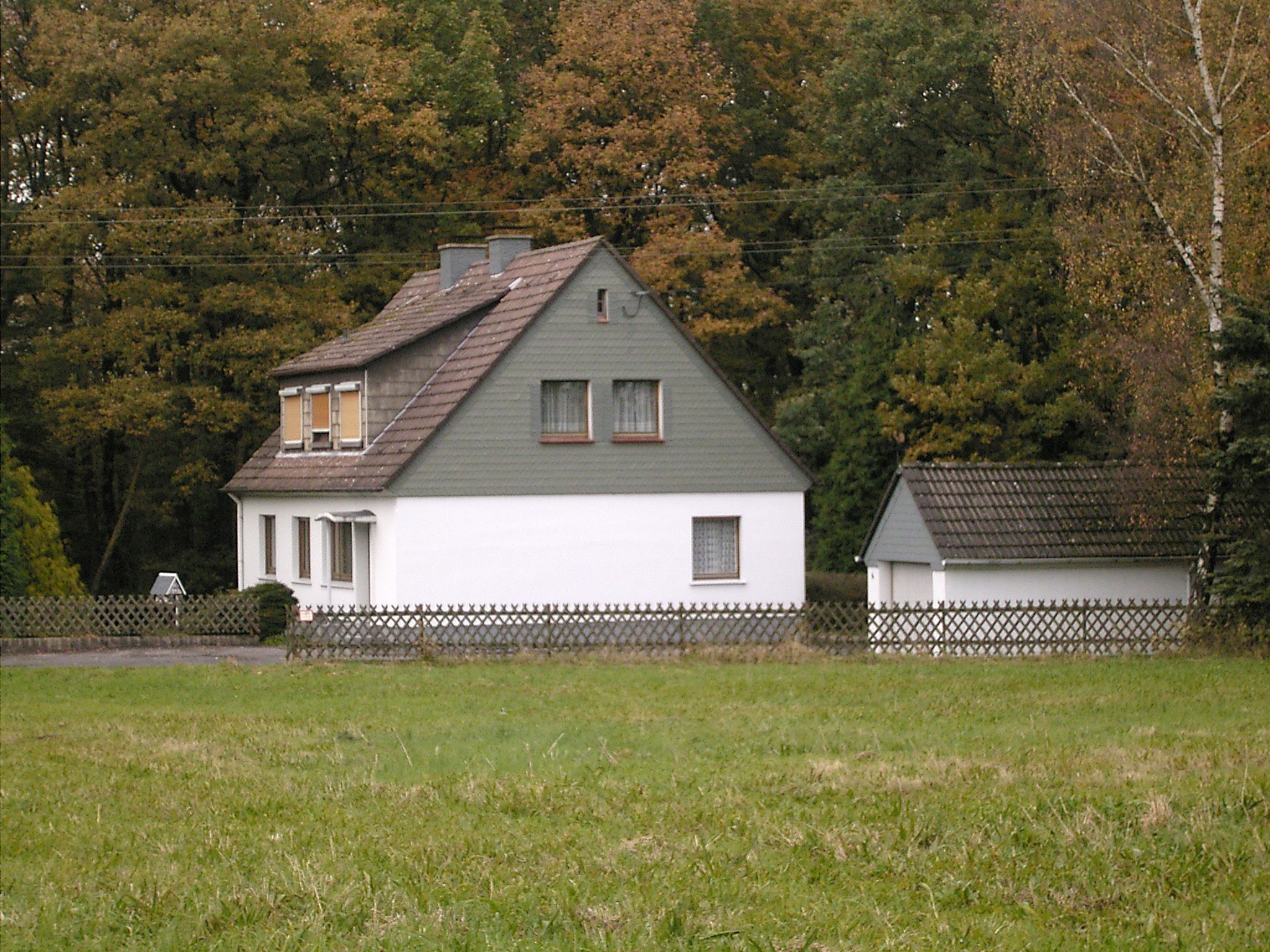 Radevormwald